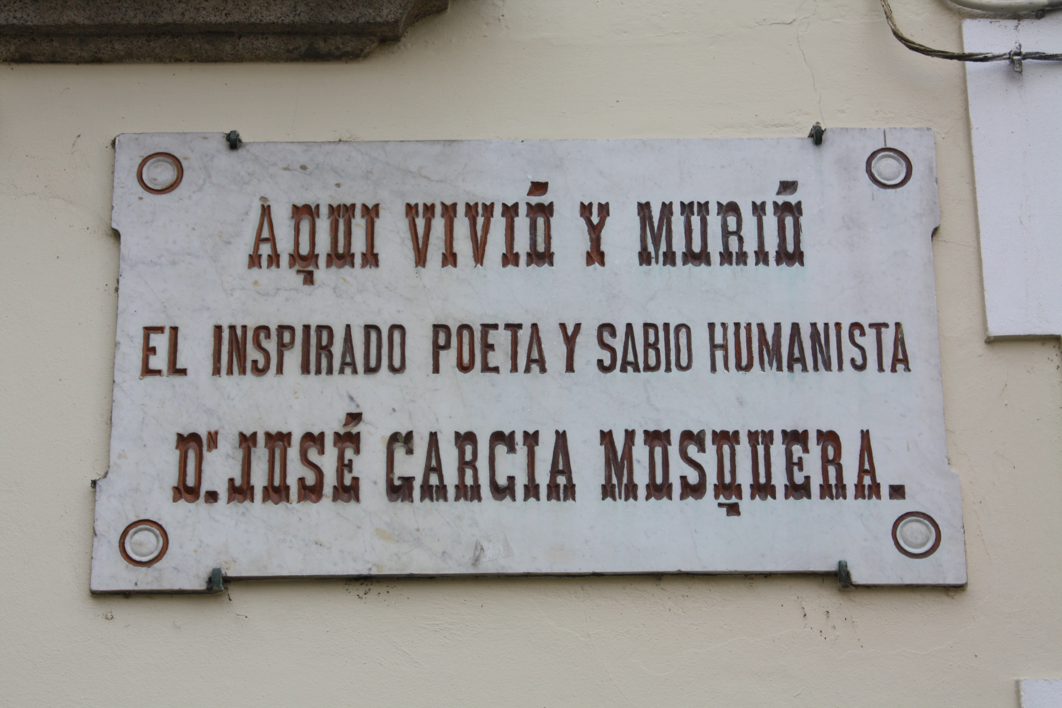 Placa na casa de Ourense onde viviu e morreu Xosé García Mosquera, escritor, profesor e tradutor galego (1817-1868)